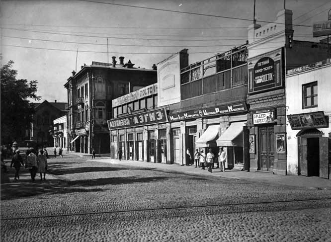 Летний кинотеатр "Красный Восток" и Азернешр на Парапете. 1920-е годы